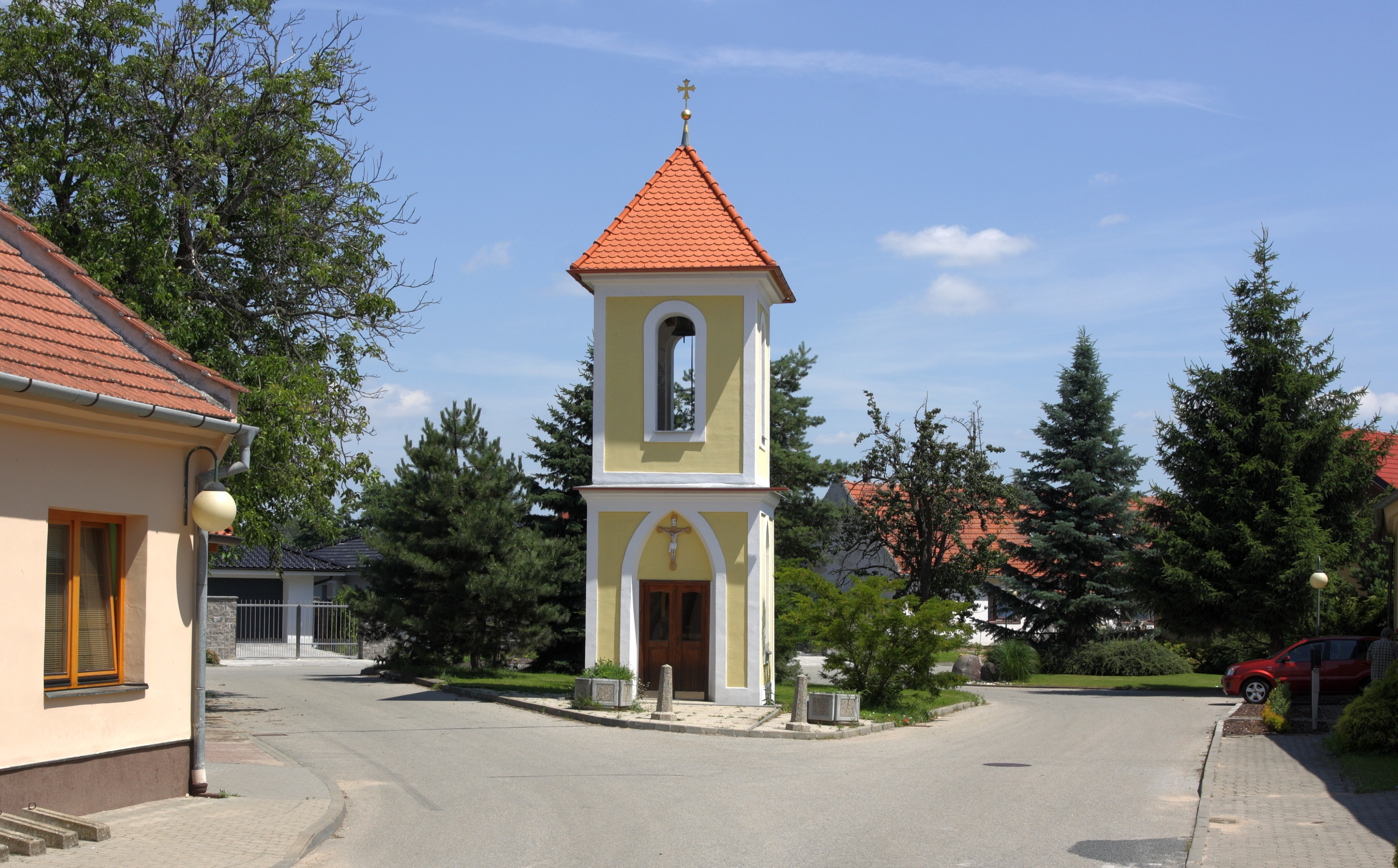 Popovice - zvonice z roku 1857.